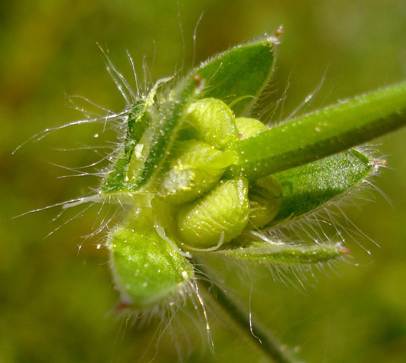 Geranium molle (Unterfranken, Germany)